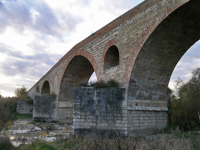 Il Ponte Valentino sul fiume Calore a Benevento